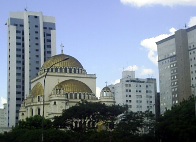 Catedral Metropolitana Ortodoxa de São Paulo.